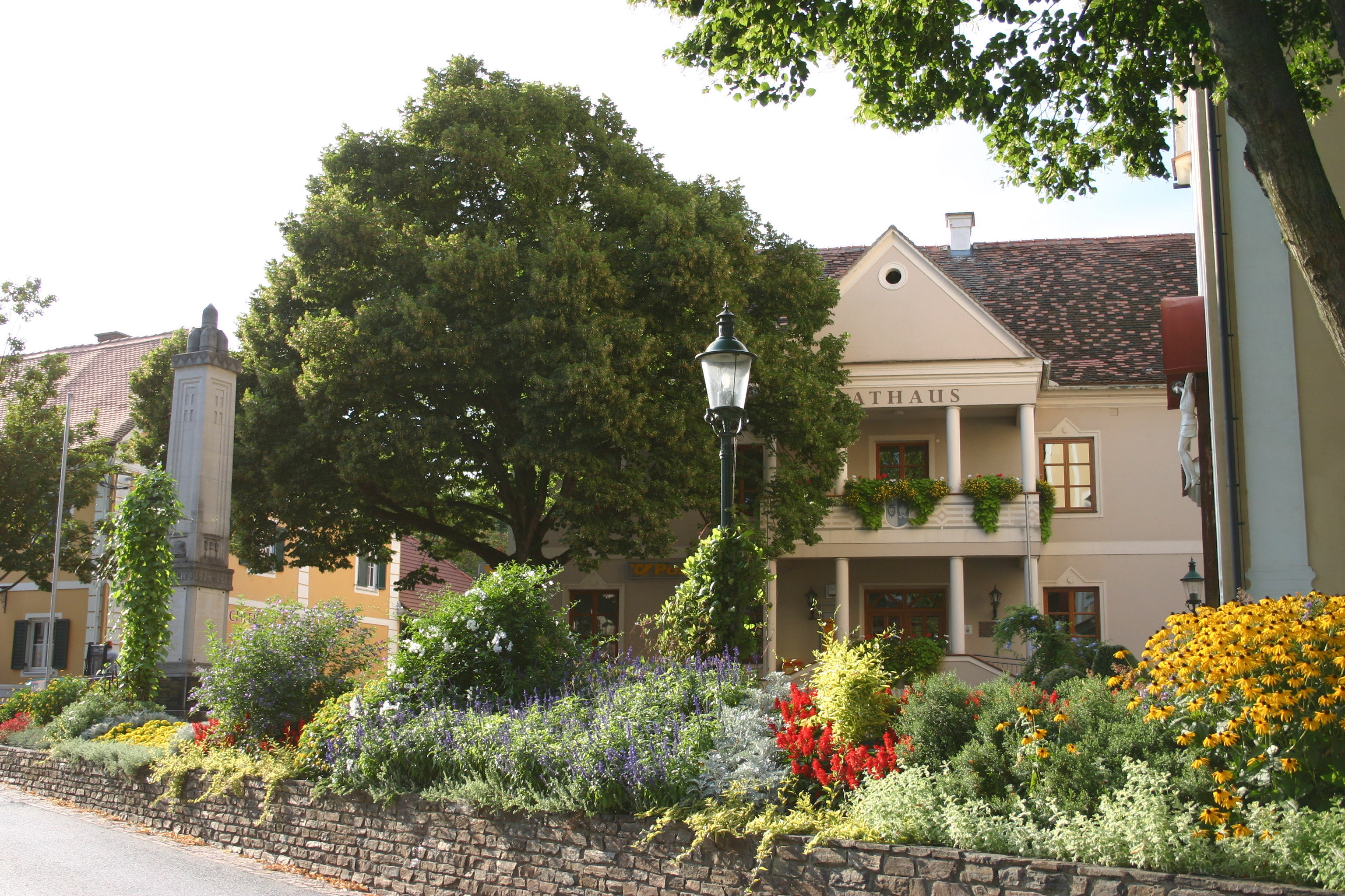 Bad Waltersdorf, Rathaus